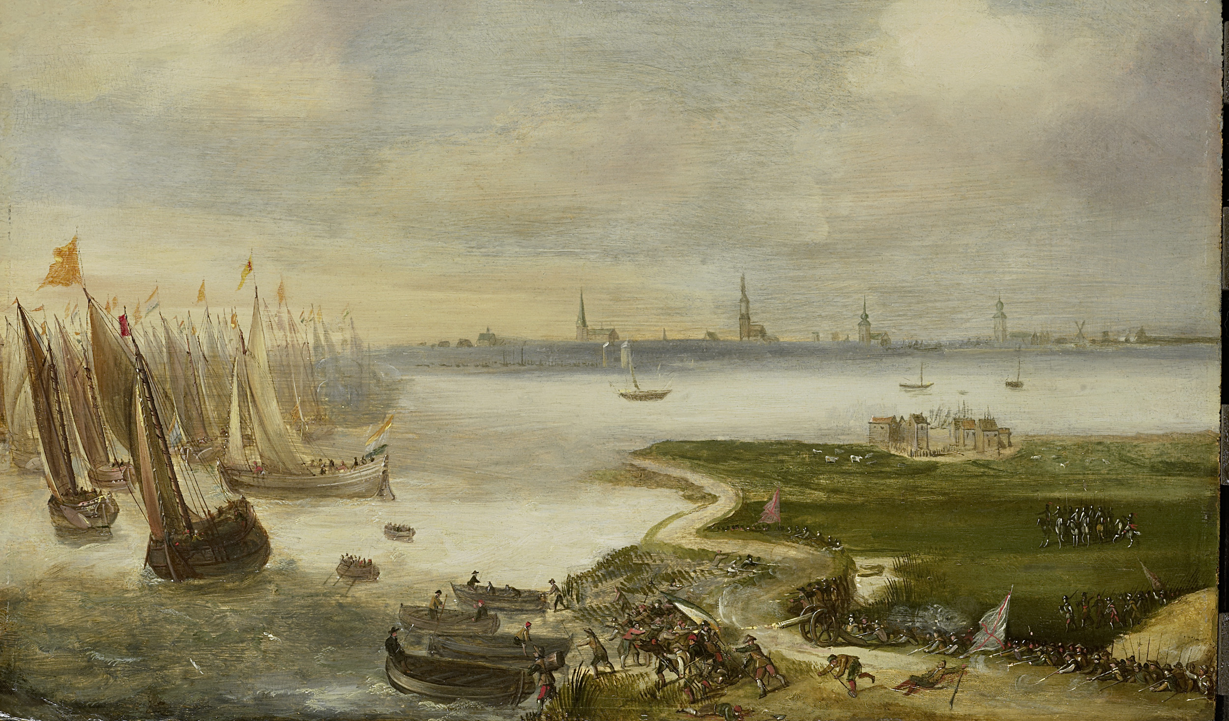 De mislukte aanslag op Antwerpen door prins Maurits, 17 mei 1605. Gevecht op de Blokkersdijk tussen de Spaanse troepen en de watergeuzen die aan land trachten te komen. Links de vloot van de geuzen op de Schelde, in de verte het profiel van de stad Antwerpen.